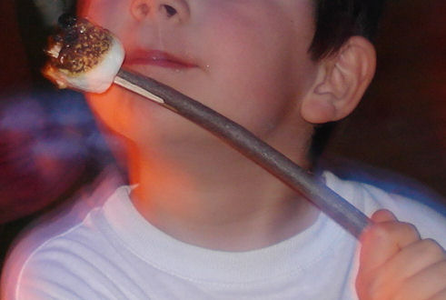 Guimauve grillée au feu de bois au Québec